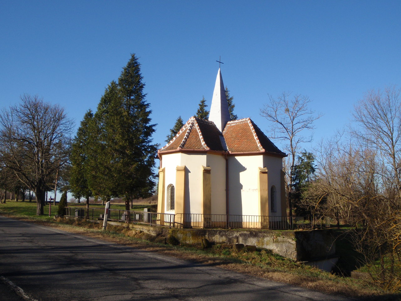 Szentkúti Kápolna Váton 86-os főút felől